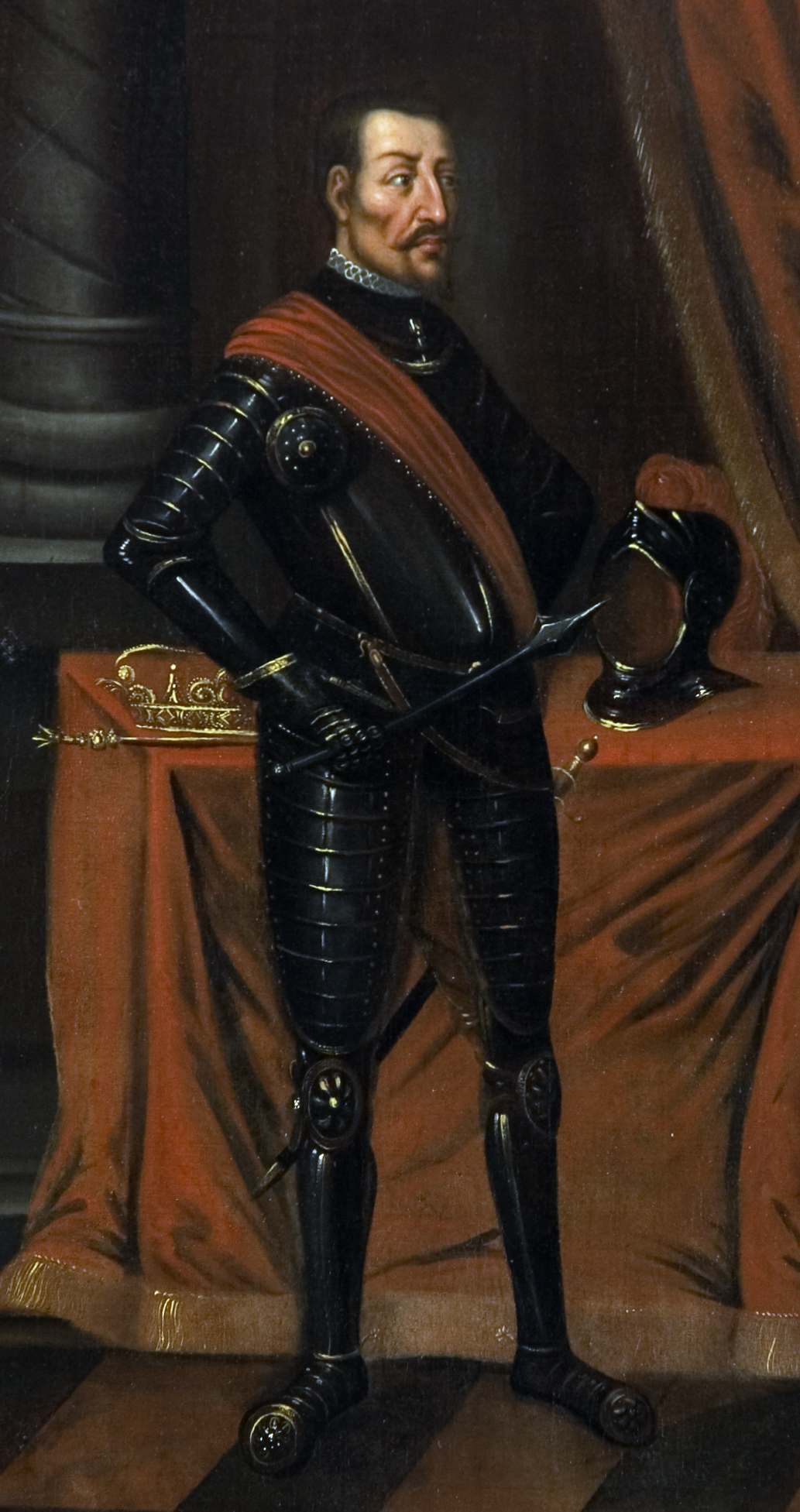 Беларуская (тарашкевіца): Партрэт вялікага князя Казімера Ягайлавіча (Kazimier Jagajłavič)